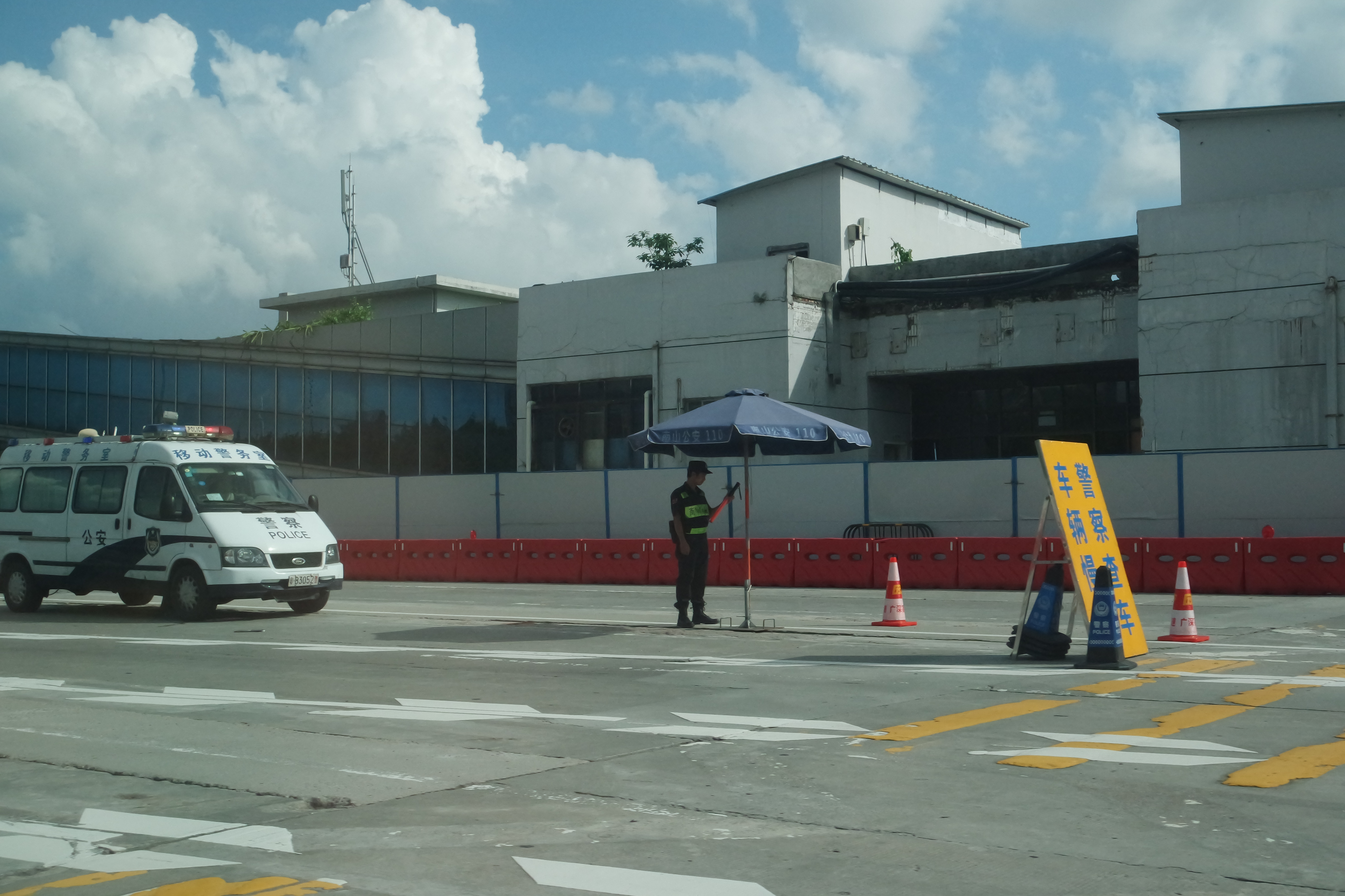 中文（中国大陆）: 拍摄地点：中国广东省深圳市G4广深港高速同乐检查站 单位：深圳市公安局交警支队 车牌号：粵B3052警